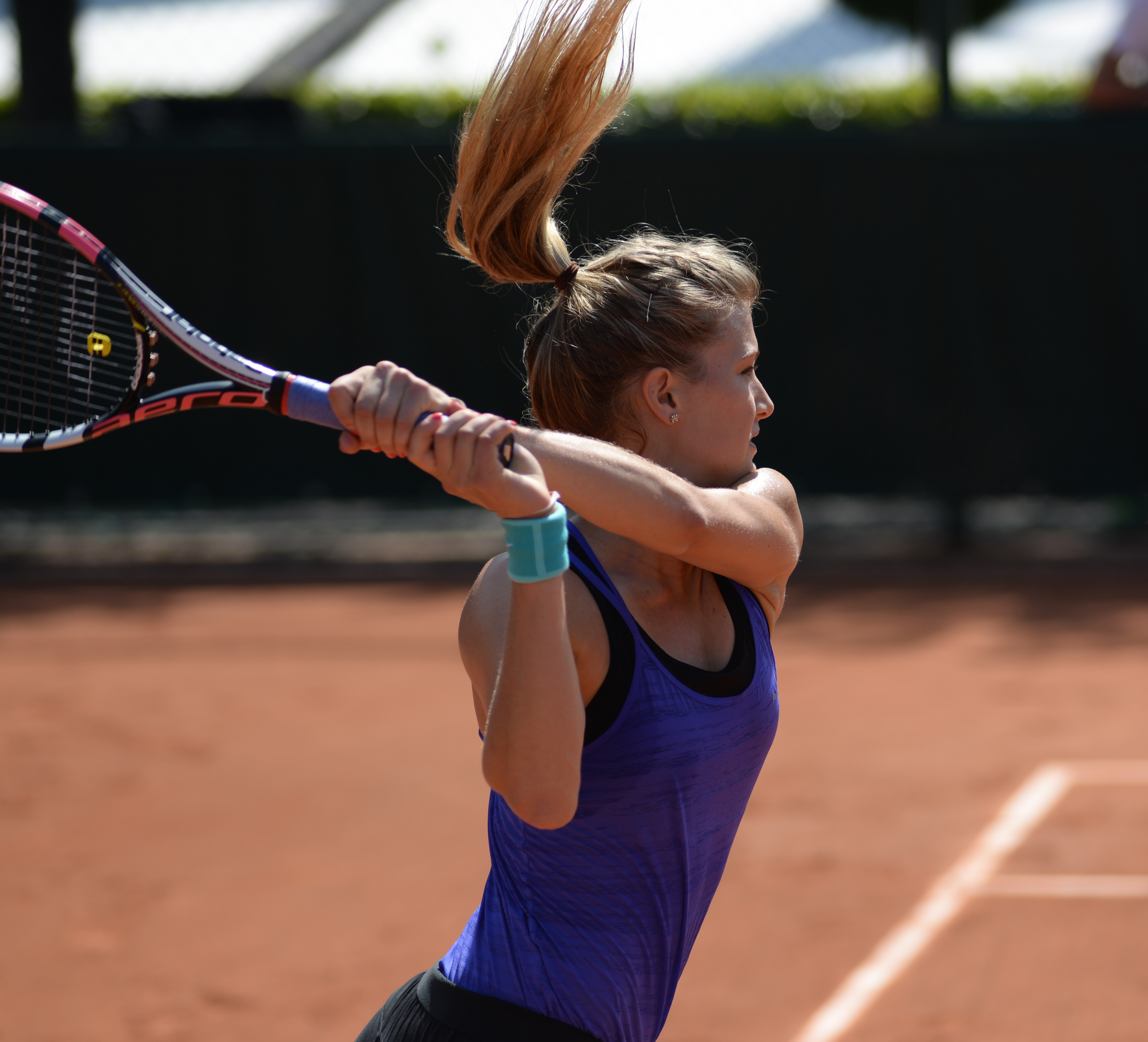 Eugenie Bouchard